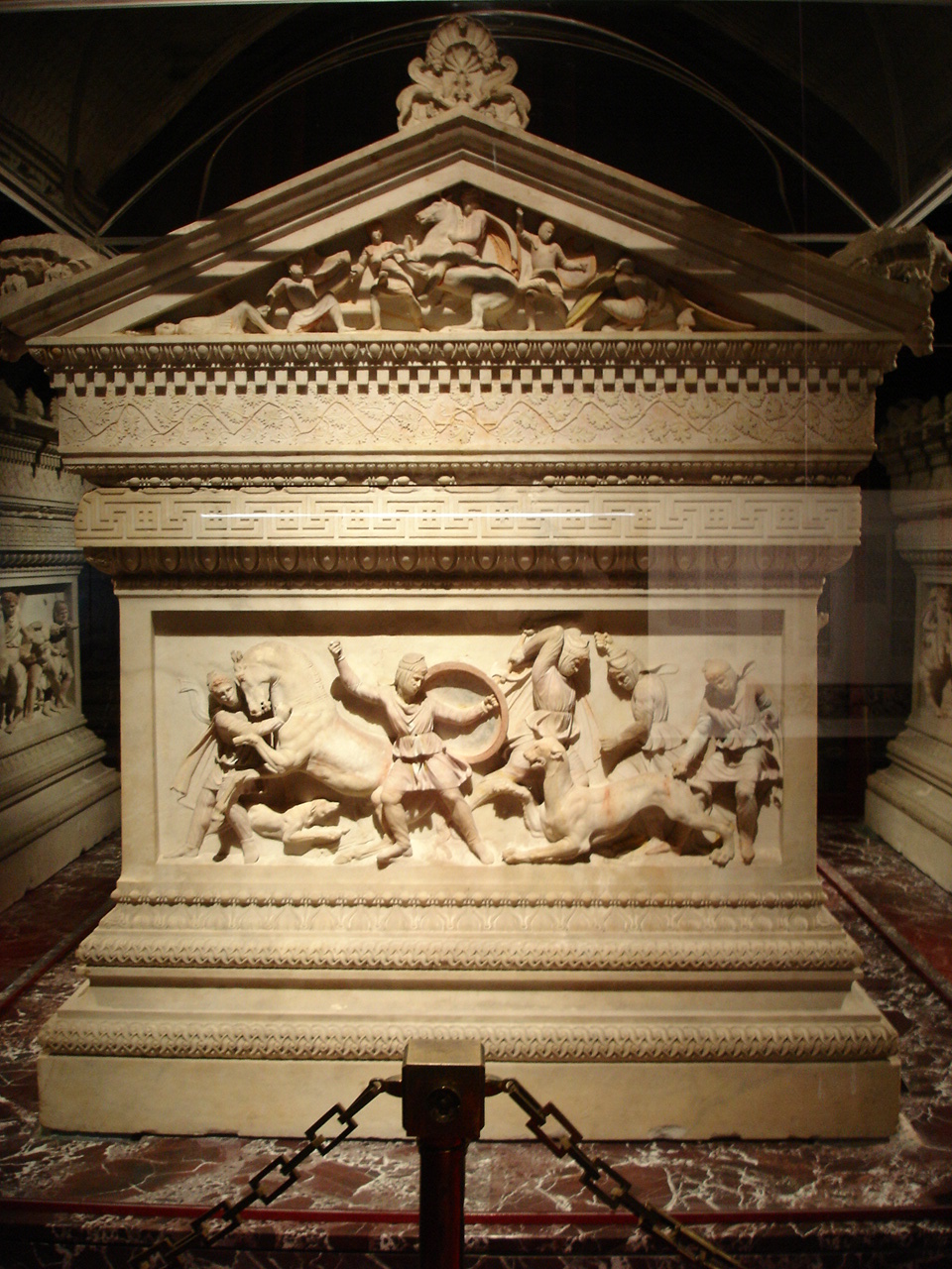 Istanbul - Museo archeologico - Sarcofago di Alessandro, sec. IV a.C. - Foto di: Giovanni Dall'Orto 28-5-2006.